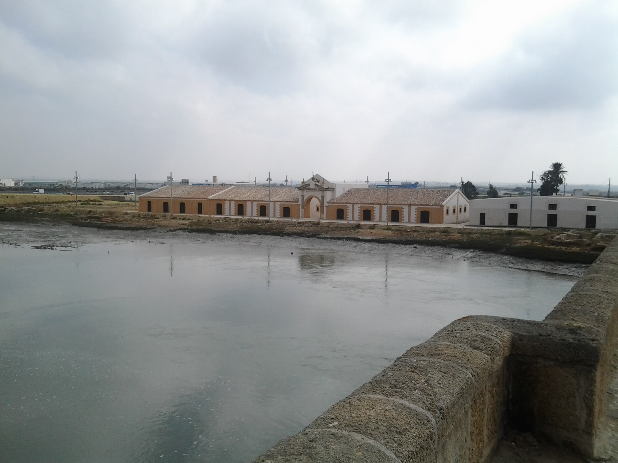 Vista general del Real Carenero desde el Puente Zuazo